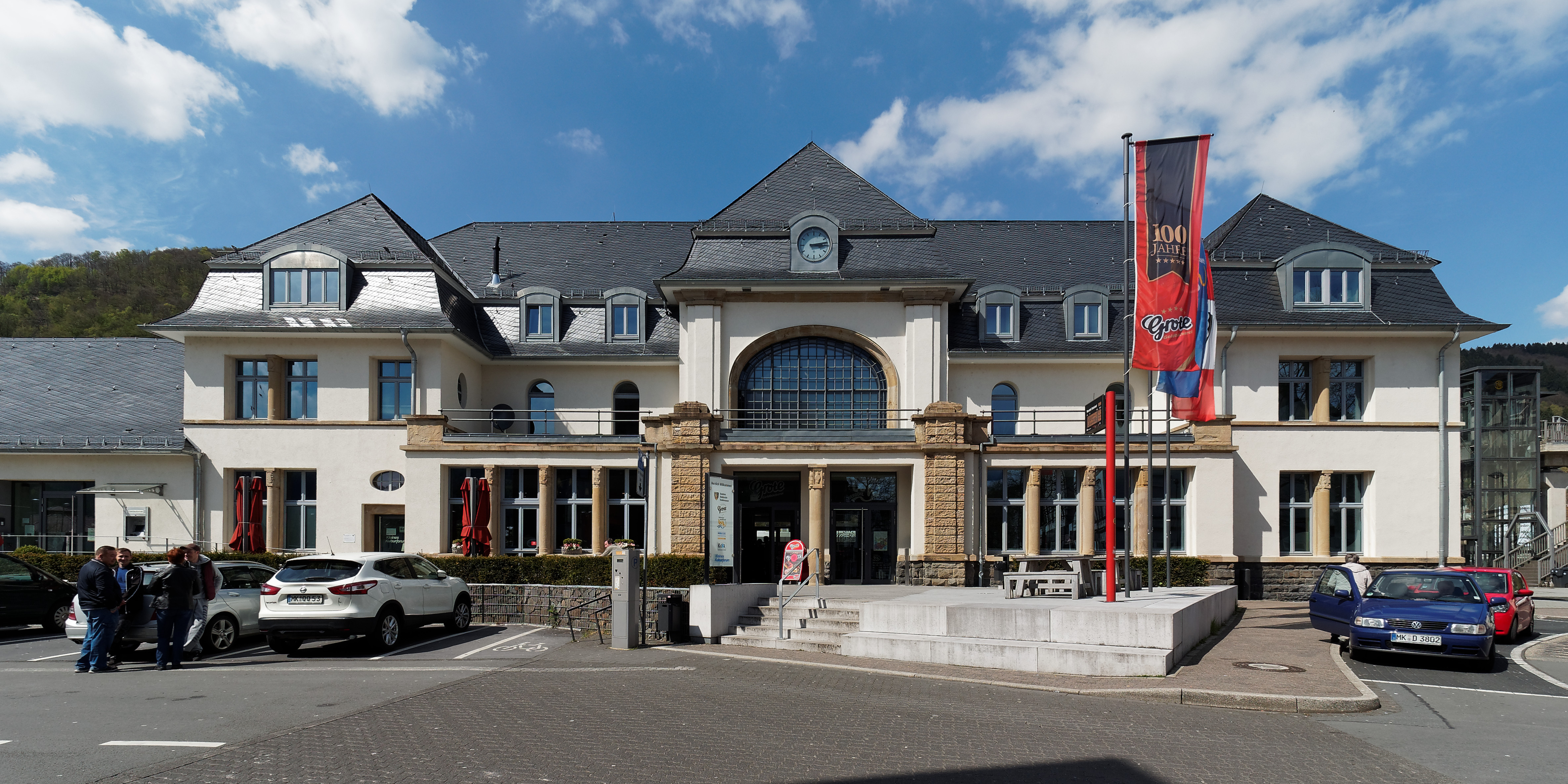 Das ehemalige Bahnhofsgebäude in Werdohl nach Renovierung